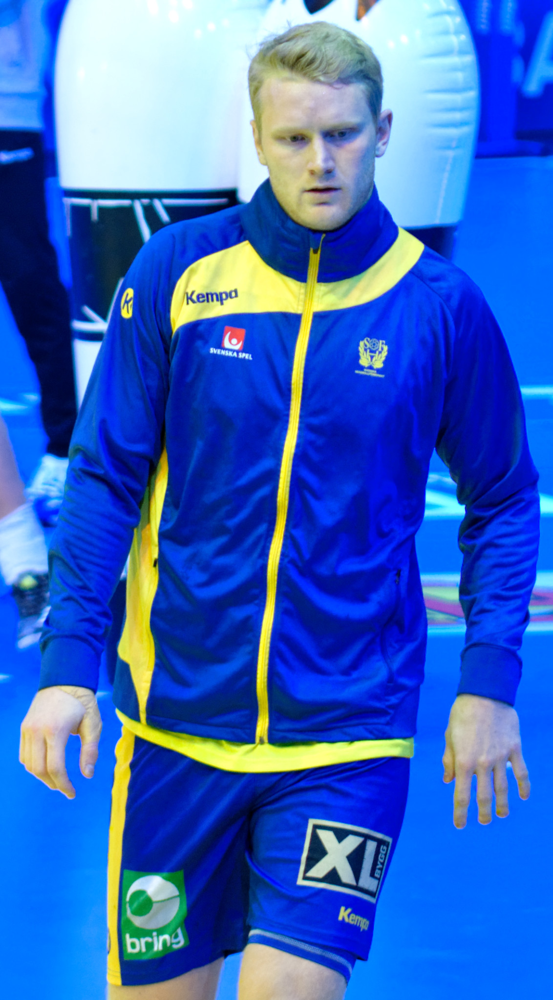 Match de la phase préliminaire du championnat du monde masculin de handball 2017 entre la Suède et le Danemark (Groupe D). A Bercy, le 16 janvier 2017.